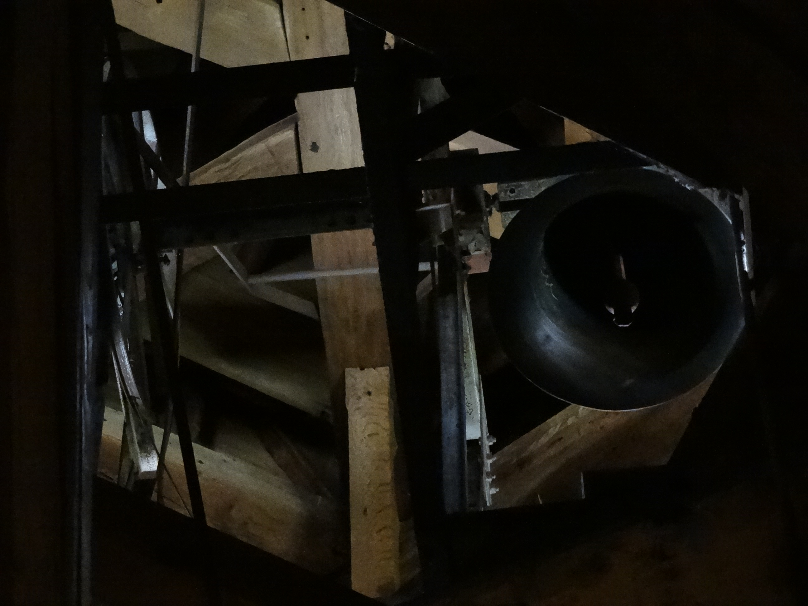 Alte Kirche (Watzenborn-Steinberg)